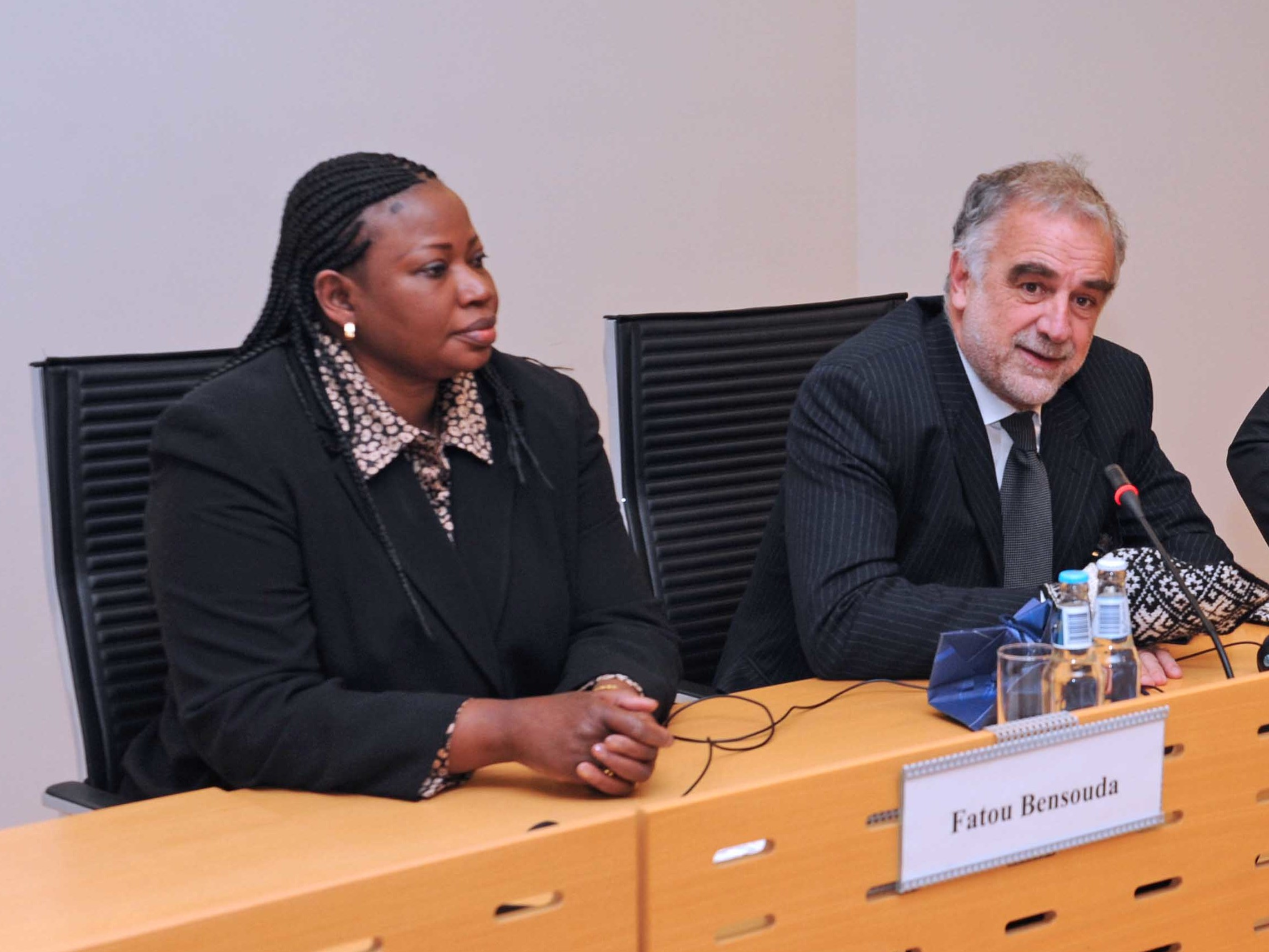 Vasakult paremale rahvusvahelise kriminaalkohtu (International Criminal Court, ICC) juunist 2012 peaprokuröri ametisse asuv Fatou Bensouda, praegune ICC peaprokurör Luis Moreno-Ocampo, Eesti välisminister Urmas Paet ja ICC liikmesriikide assamblee president Tiina Intelmann